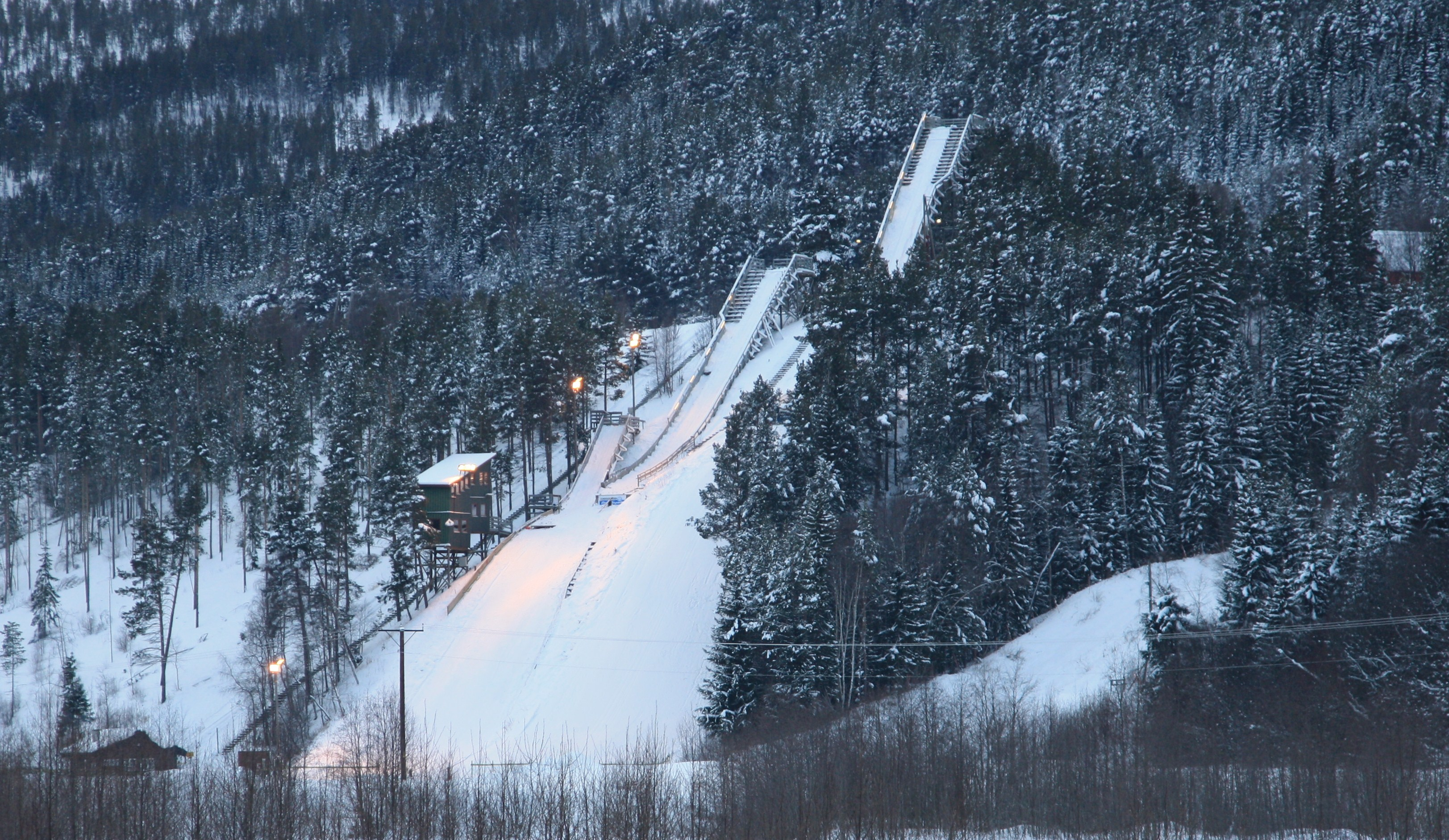 Sandeggbakken, Alvdal. Fra venstre: K20, K35 og K52